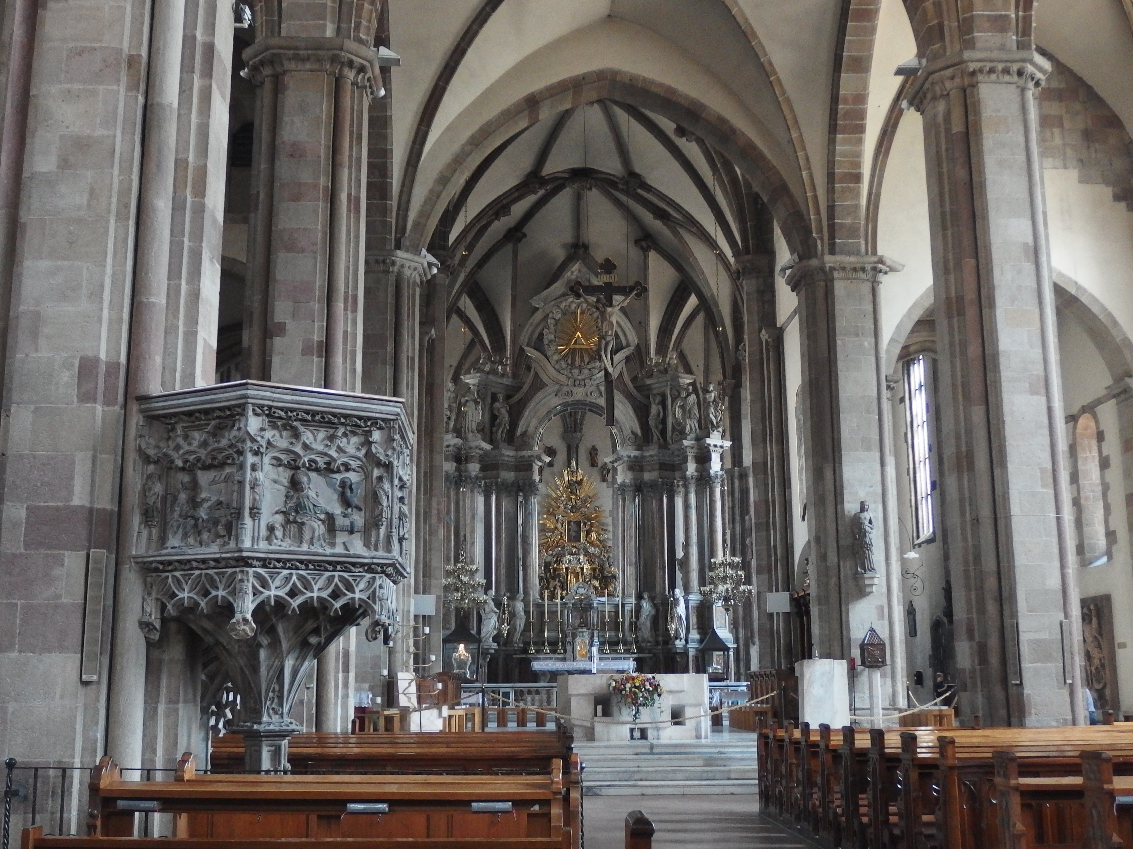 Bozen, Südtirol. Dom Maria Himmelfahrt.